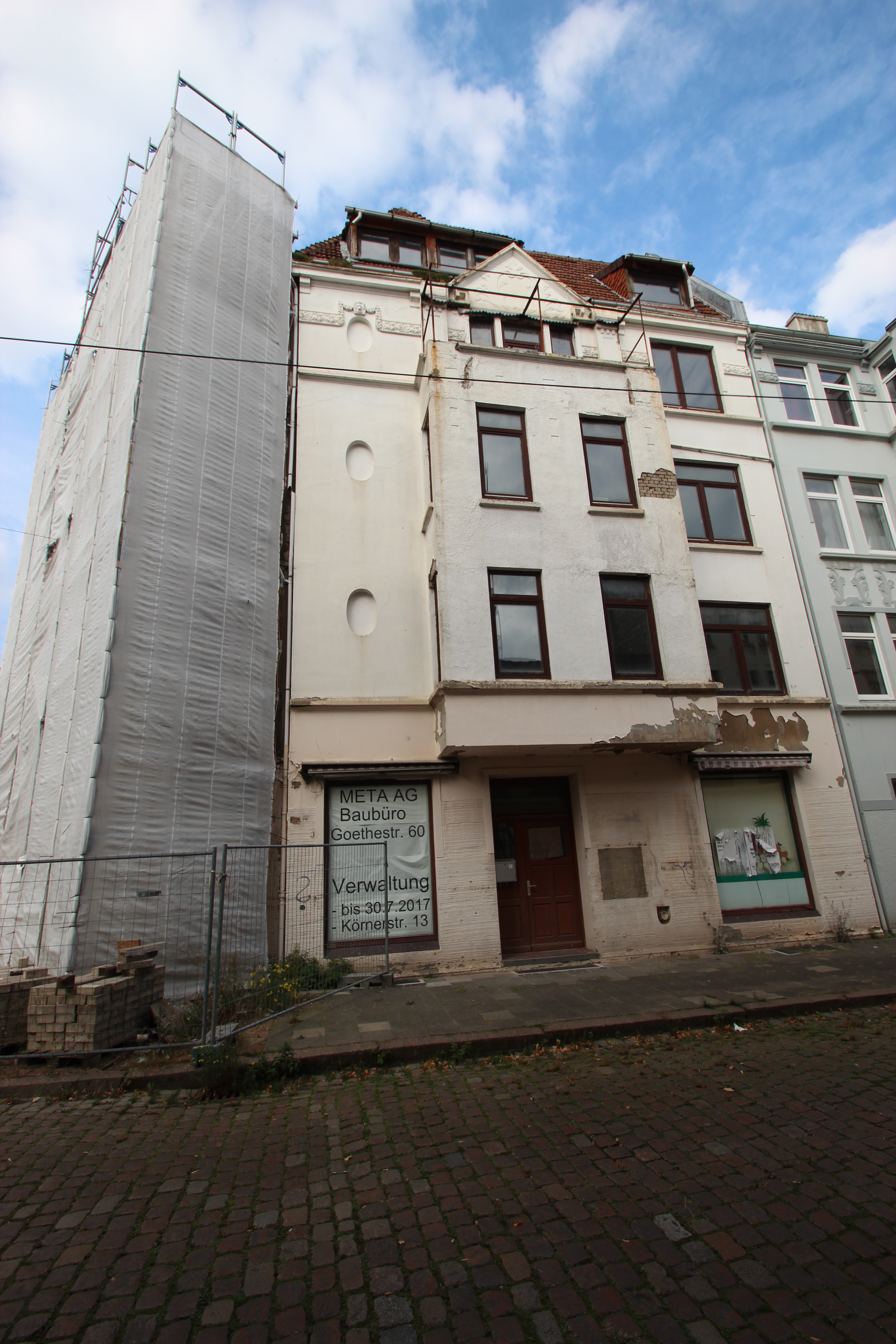 Mietshaus in Bremerhaven, Lutherstraße 24/Goethestraße 60Das abgebildete Objekt ist ein geschütztes Kulturdenkmal in der Freien Hansestadt Bremen, mit der Nr. 4362 beim Landesamt für Denkmalpflege registriert.